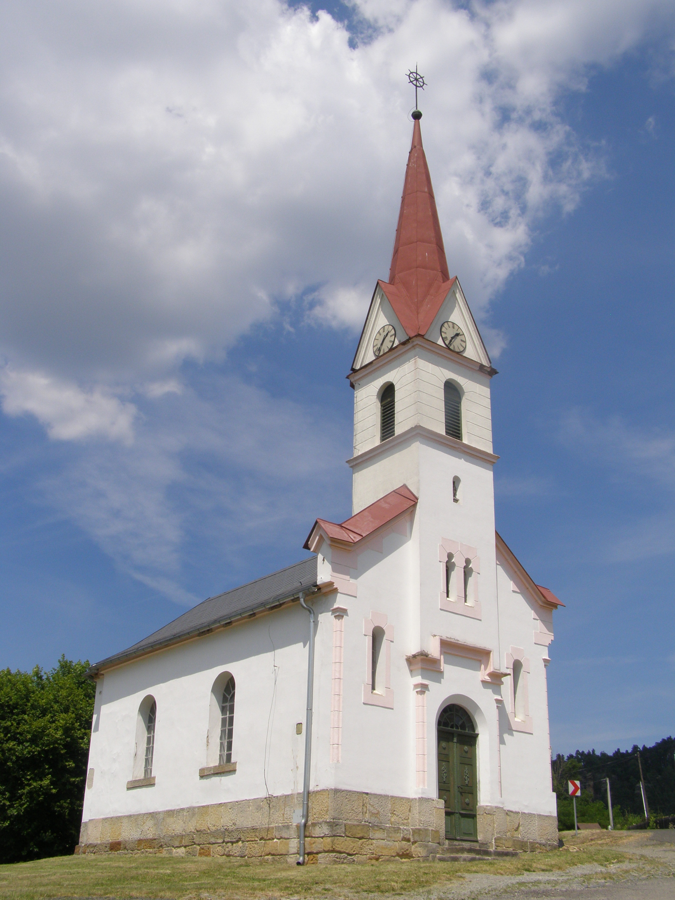 Svojkov, kaple svatého Václava